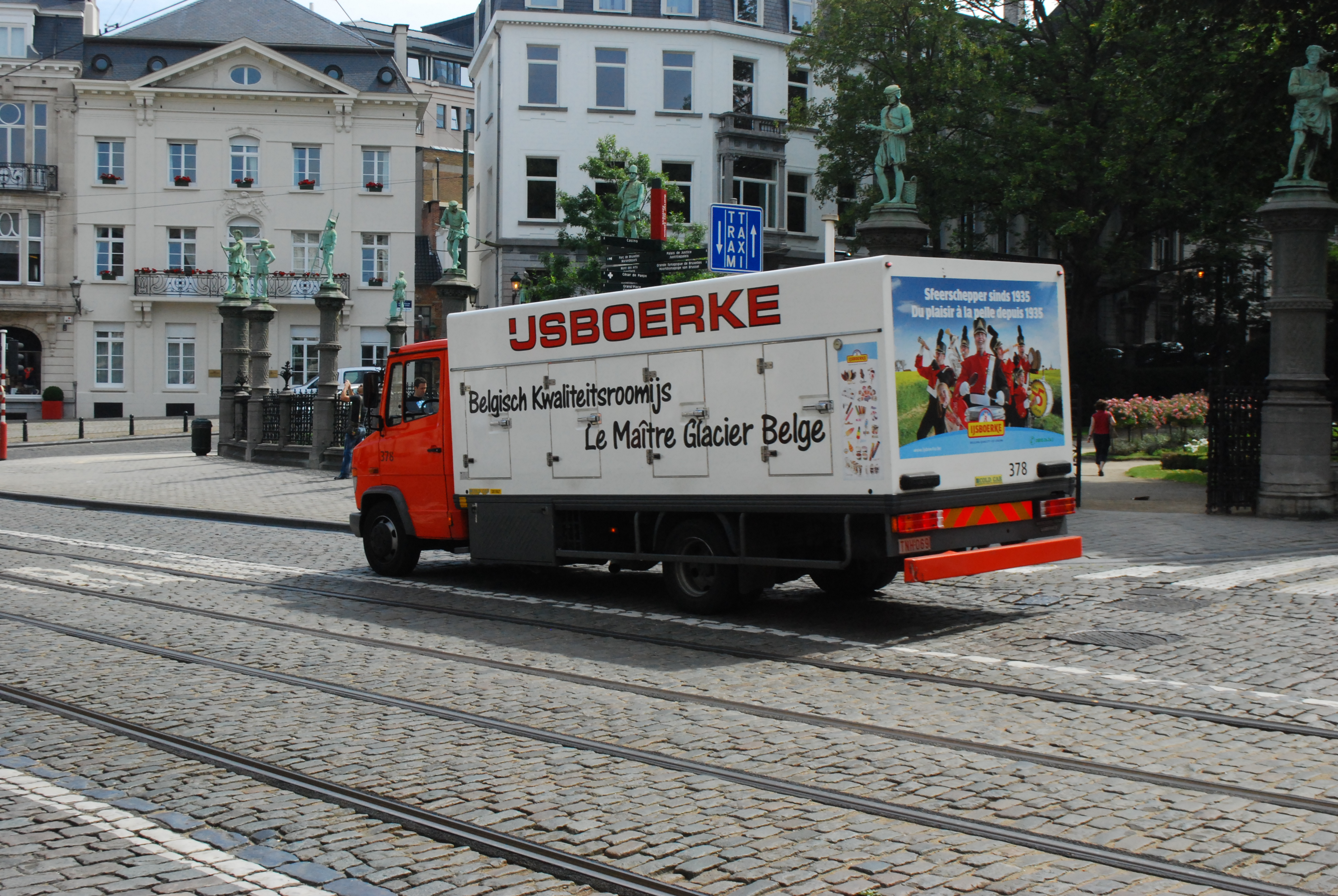 Camion frigorifique de crème glacée dans la rue de la Régence à Bruxelles, à hauteur du square du Petit Sablon.